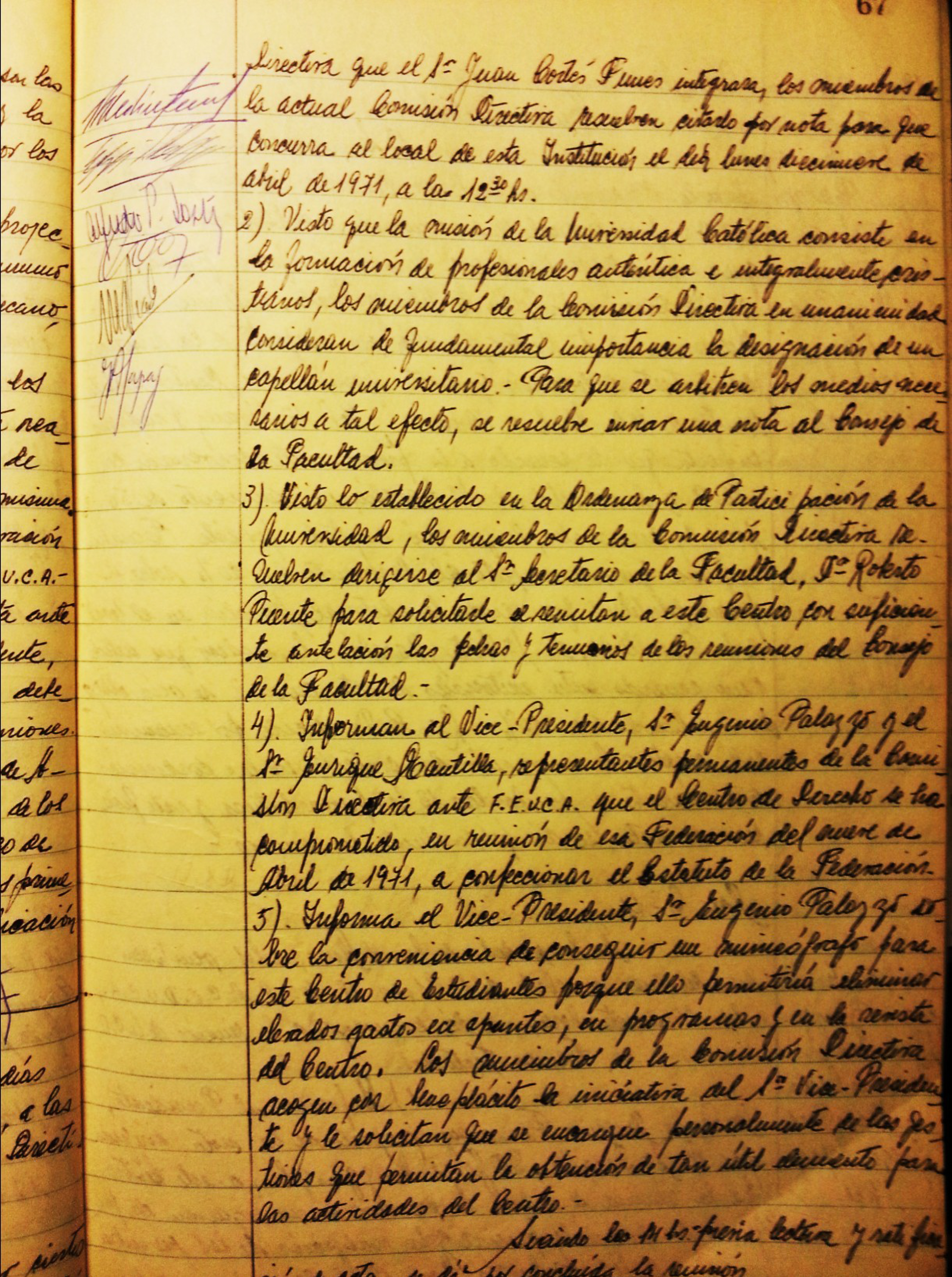 Acta del Centro de Estudiantes de Derecho de la Universidad Católica Argentina del mes de abril del año 1971. En el punto 4 consta la redacción del Estatuto de la Federación de Estudiantes (FEUCA).